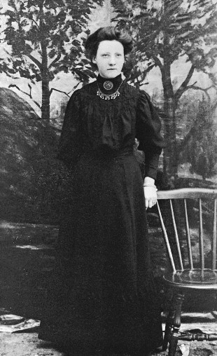 Svarta Bjorn (Anna Rebecka Hofstad)